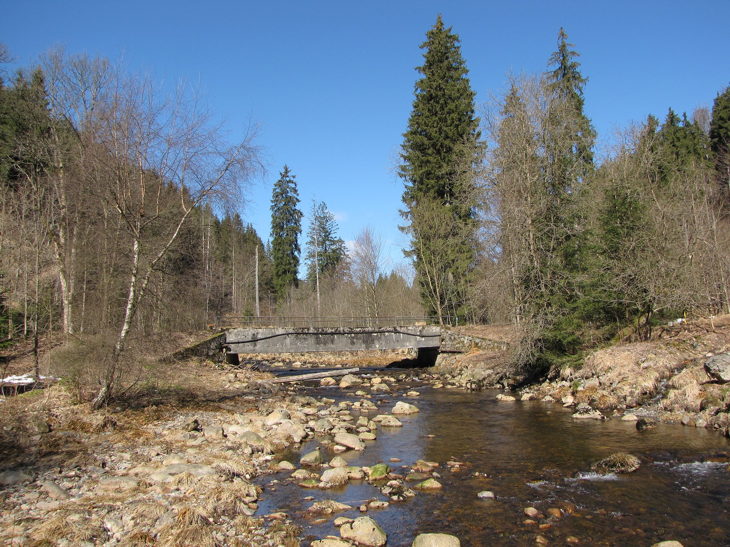 Die Oder unterhalb des Oderberges